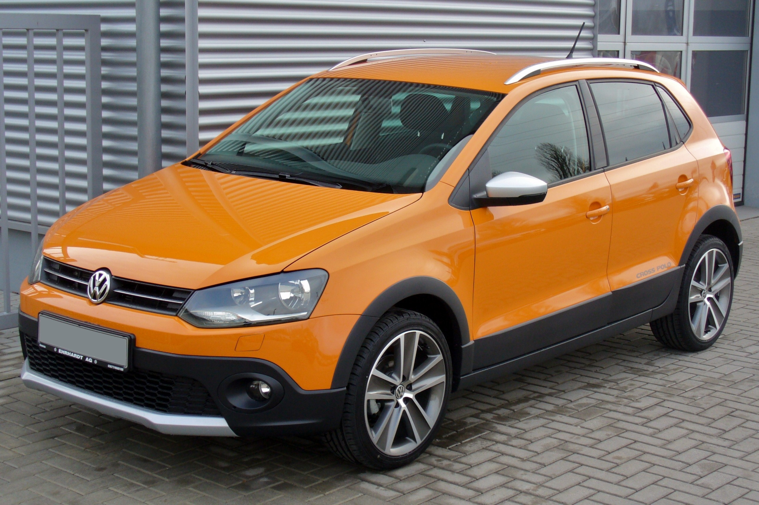 VW CrossPolo